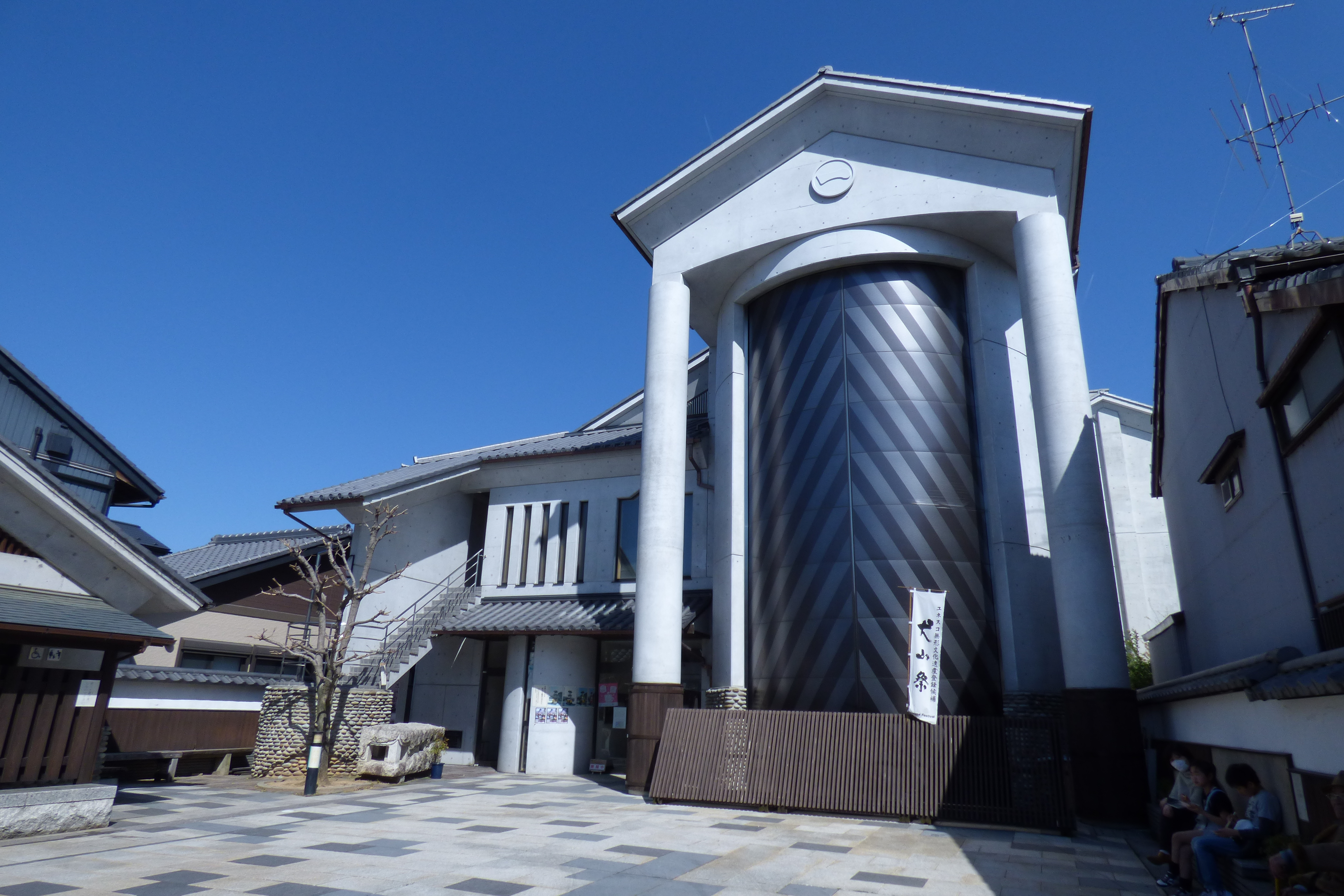 これは愛知県犬山市にある「どんでん館」の外観の写真です。